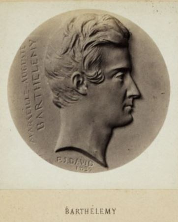 Auguste Marseille Barthélemy (1794-1867) médaillon (1829) par David d'Angers in Les médaillons de David d'Angers réunis et publiés par son fils Robert David d'Angers (1833-1912), 1867